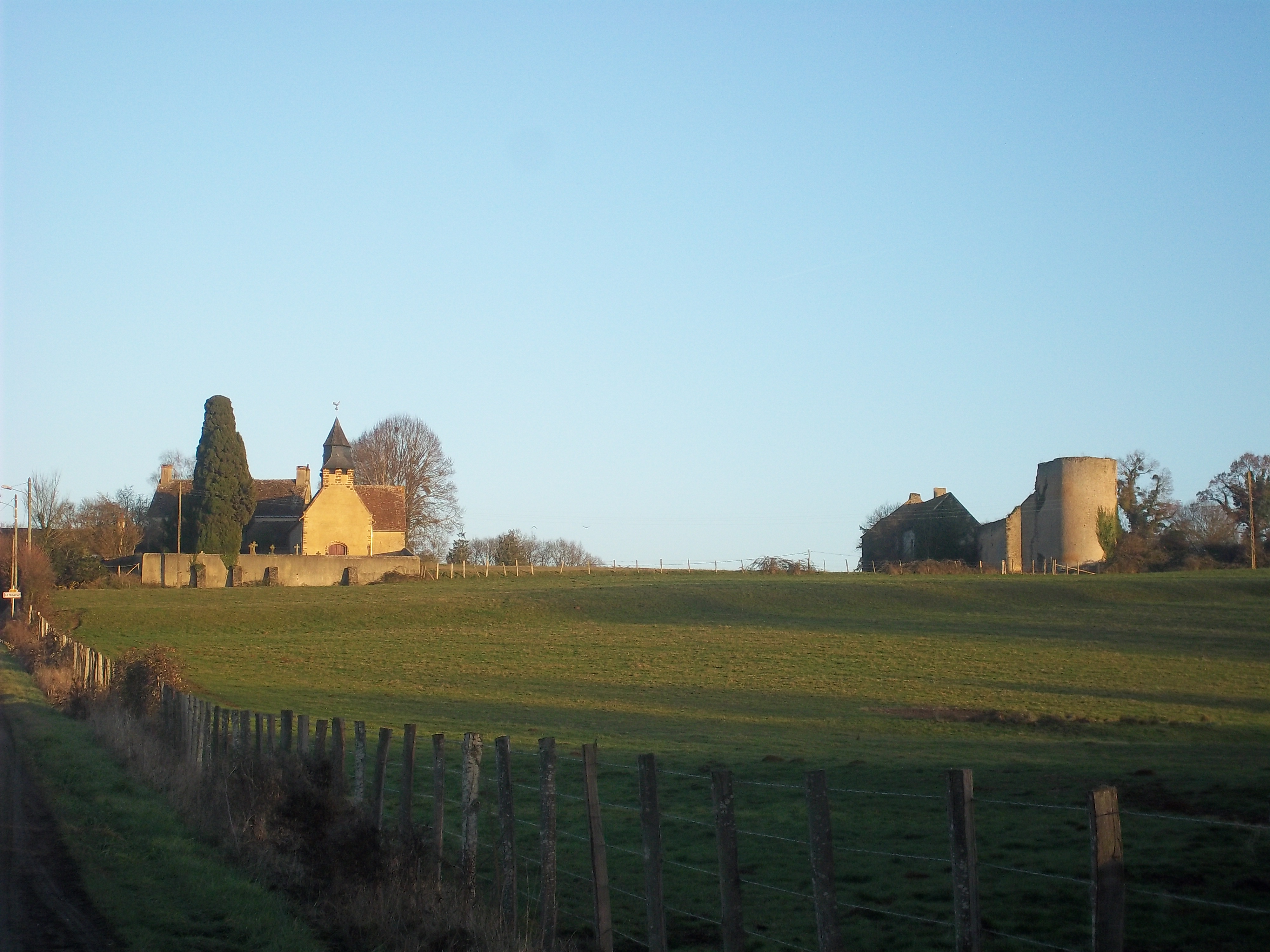 L'église et le pigeonnier - Le Tronchet (72)